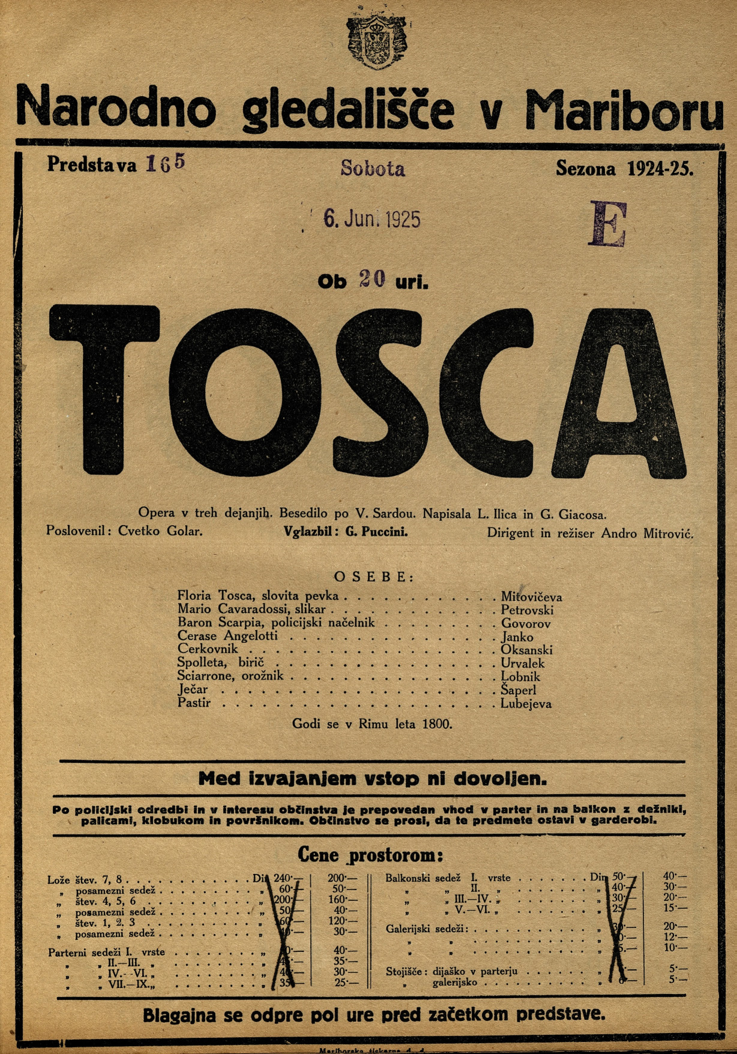 Plakat za predstavo Tosca v Narodnem gledališču v Mariboru.